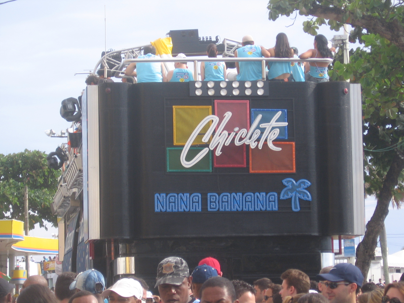 Nana Banana (Carnaval de Salvador 2007)